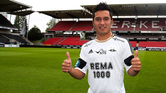 Futbolista de El Salvador